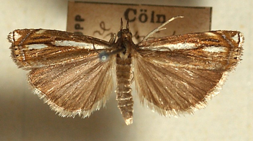 Crambus ericellus